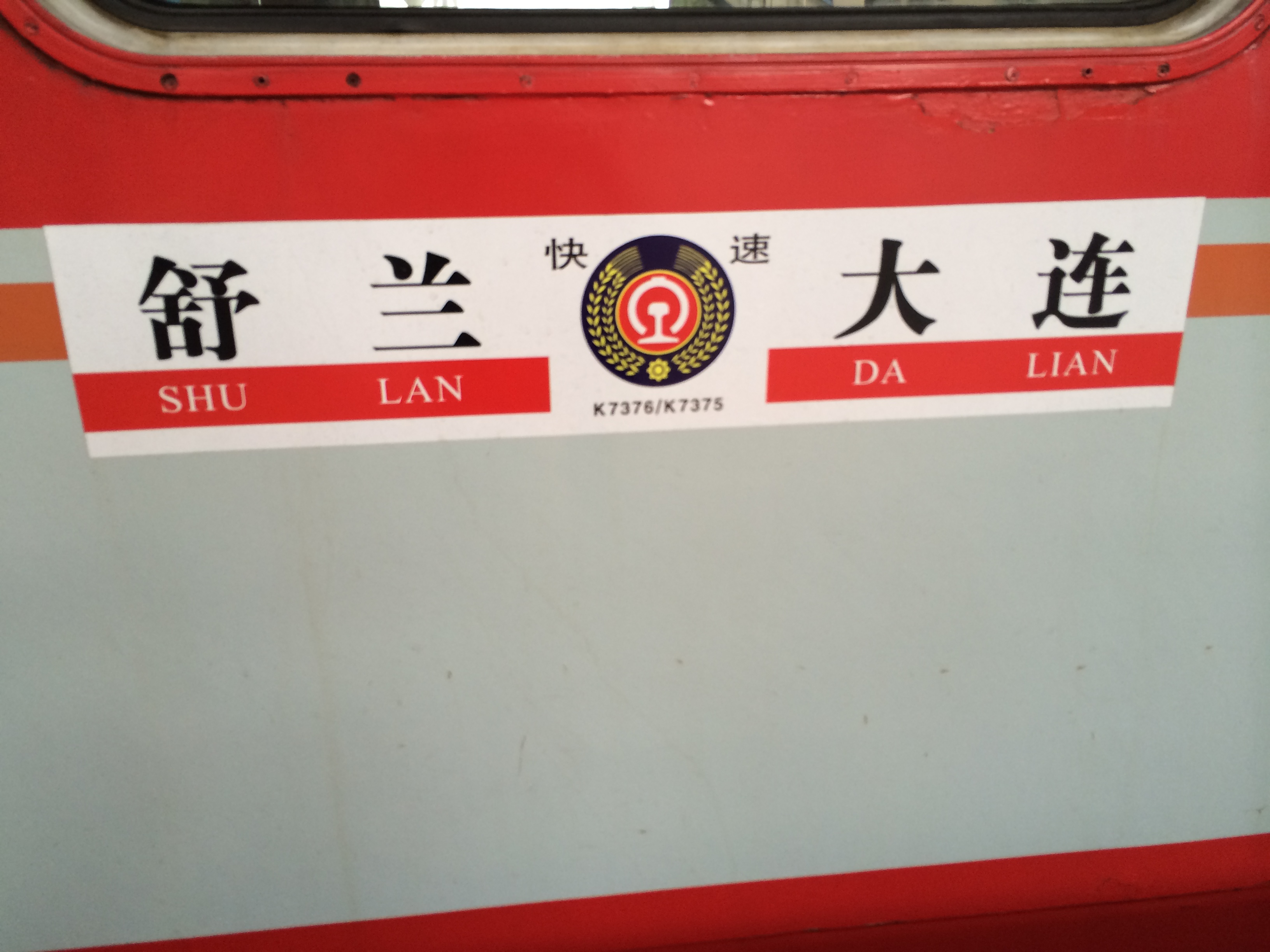 K7375/6 列车方向牌 摄于2014年6月 使用空调车体